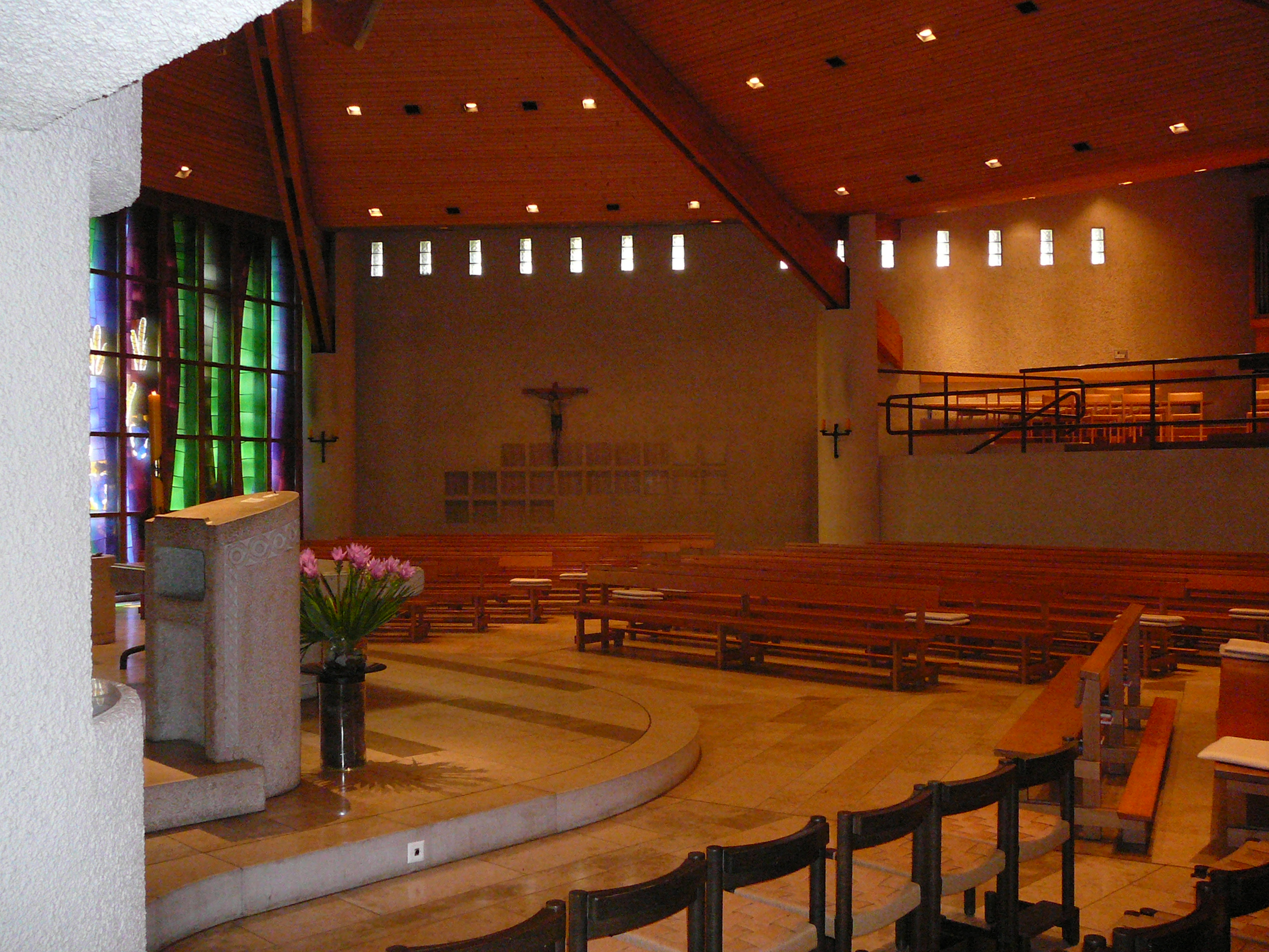 Römisch-katholische Pfarrkirche St. Anna, Opfikon-Glattbrugg, Innenansicht